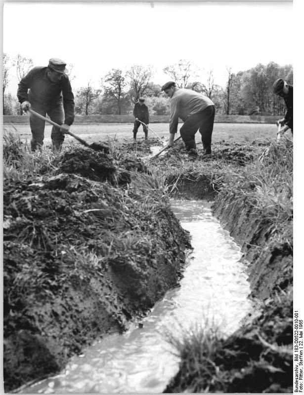 Ranies, Anlegen von Entwässerungsgräben Zentralbild Ritter 22.5.1965 Auf ihren überfluteten Äckern . . . ziehen die Genossenschaftsbauern der LPG Typ I Ranies Kreis Schönebeck-Elbe Gräbern, um das Wasser von den Feldern abzuleiten. Die unmittelbar an der Elbe gelegene LPG erlebte bereits die dritte Hochwasserwelle. In der gesamte Gemeinde sind seit März alle 180 Hektar Wiesen und Weiden überschwemmt.